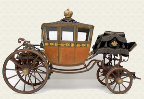 carosse utilisé par Napoléon pour son couronnement à Milan